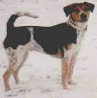 Bohemian Spotted Dog,Cesky strakaty pes,Horak Laborhund